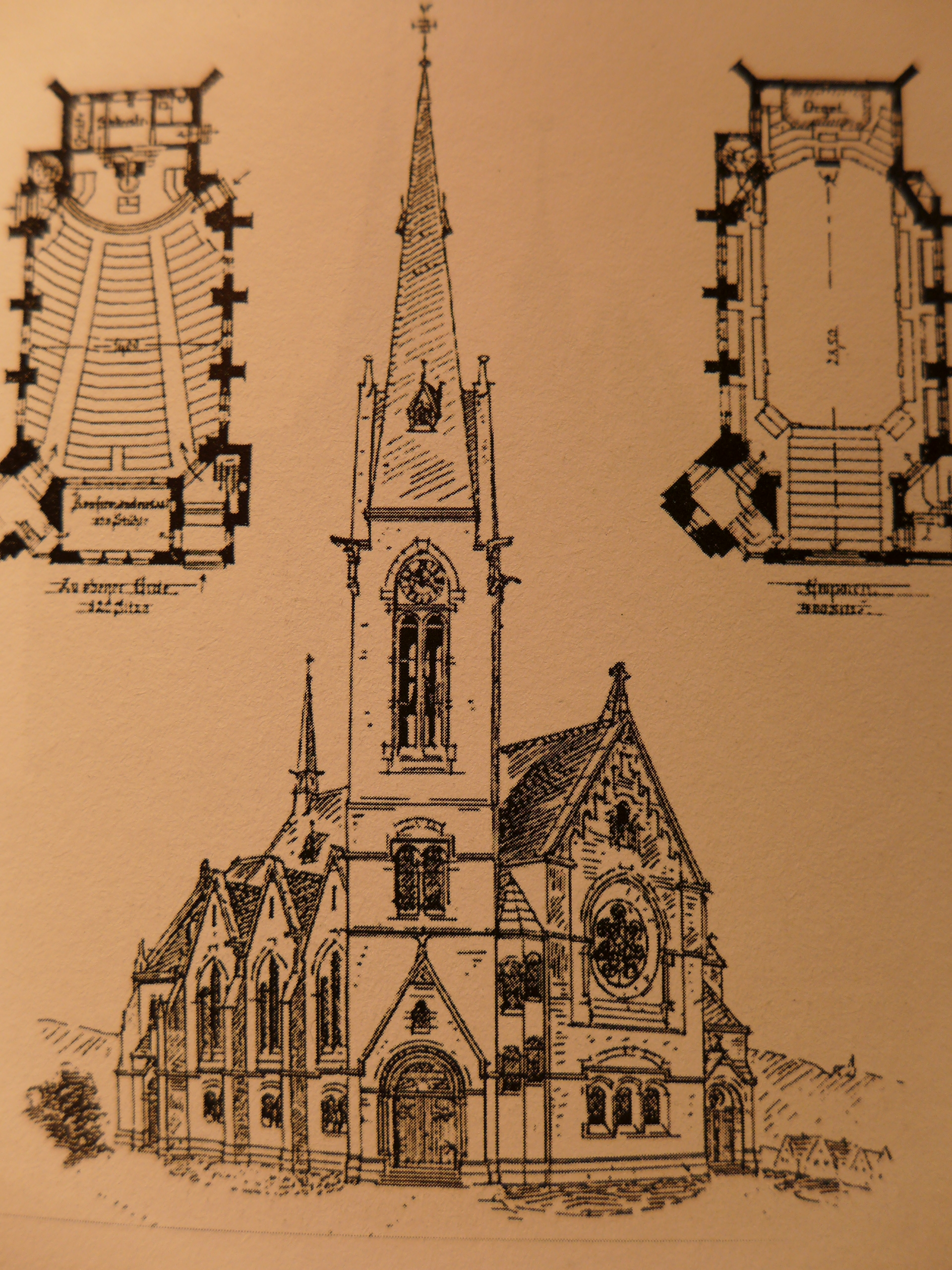 Matthäuskirche (Saarbrücken-Burbach), Entwurf Grundriss Erd- und Emporengeschoss, Nordwestansicht (Monatszeitschrift für Gottesdienst und kirchliche Kunst, 3, 1898)